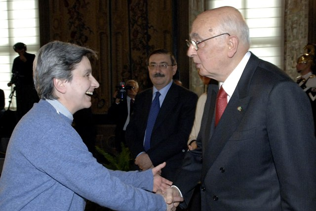 Template:ItaliaGov Suor Rita Giaretta con Giorgio Napolitano